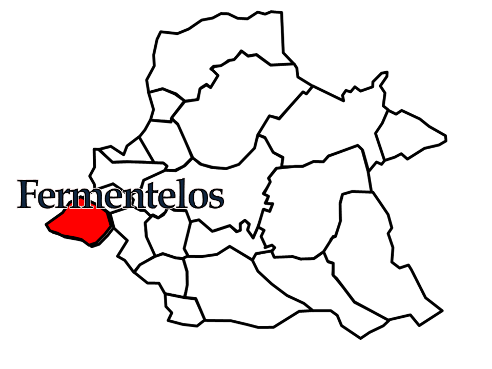 Censos 1864/2011